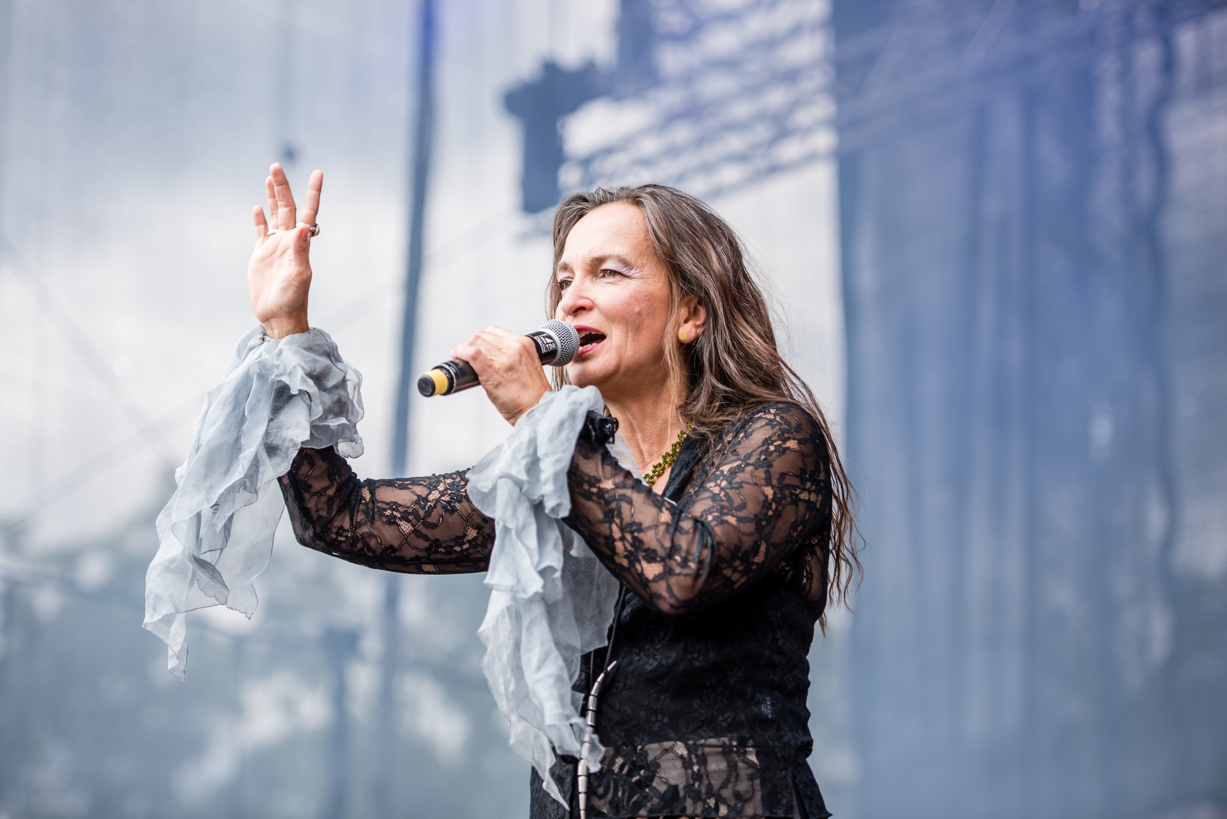 'Amphi Festival 2015; Köln - Lanxess Arena': 'Qntal'